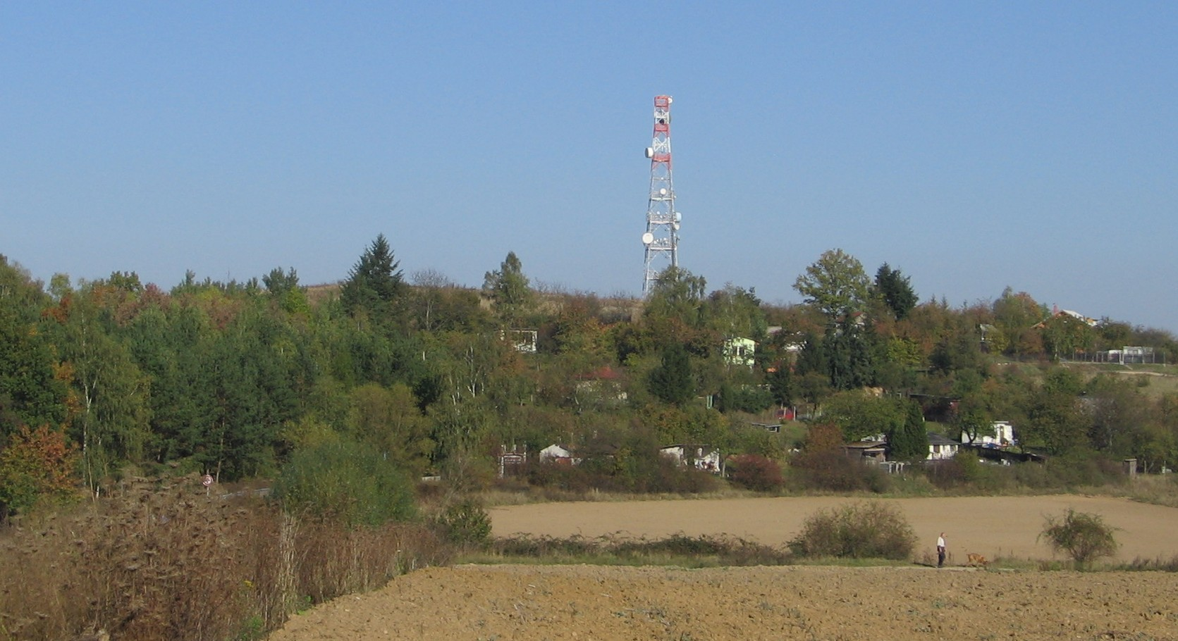 Rozhledna Sylván panorama